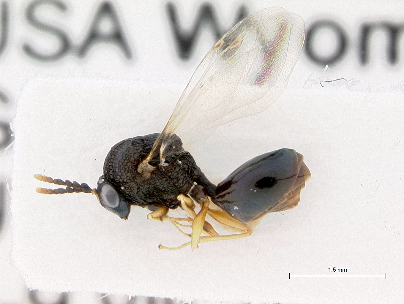 Pseudochalcura gibbosa